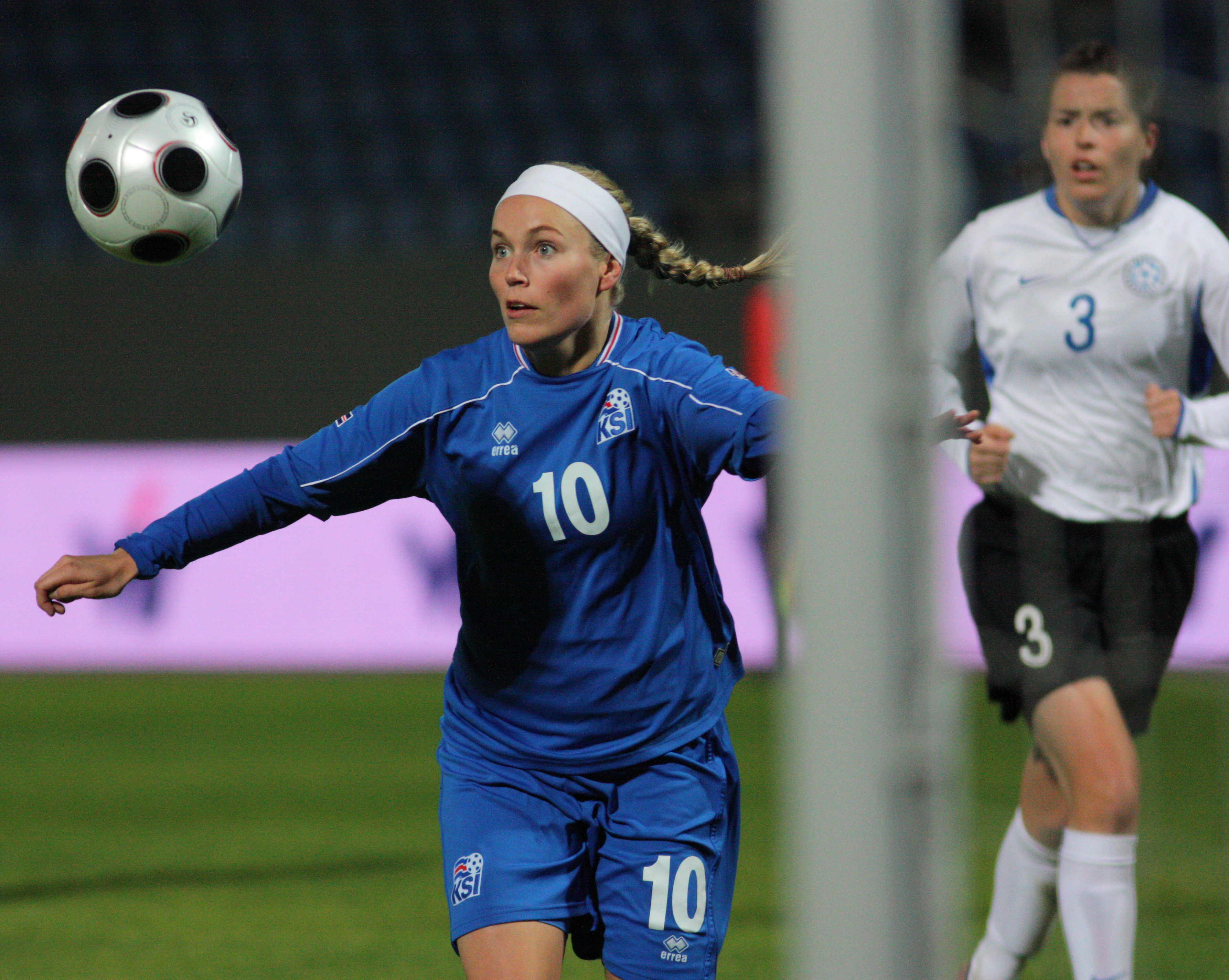 Dóra María Lárusdóttir in Iceland 12 - Estonia 0